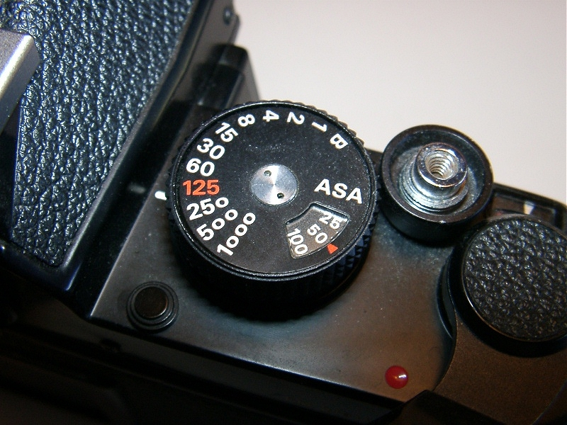 Inställningsratt för slutartiden. Foto: Användare:Chrizz